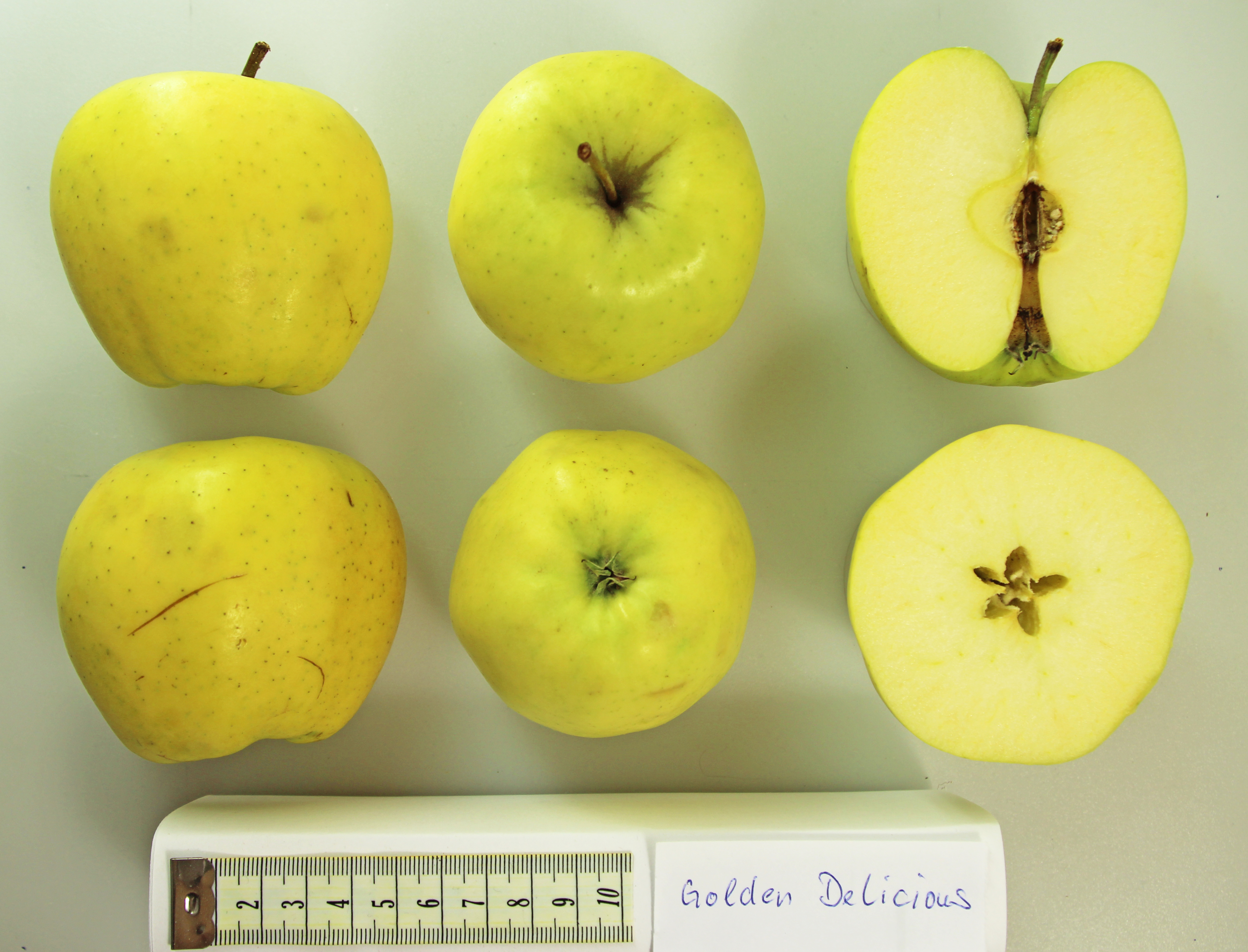 Bildinhalt: Sechs Ansichten von Äpfeln der Sorte Golden Delicious Aufnahmeort: Frankfurt am Main, Deutschland